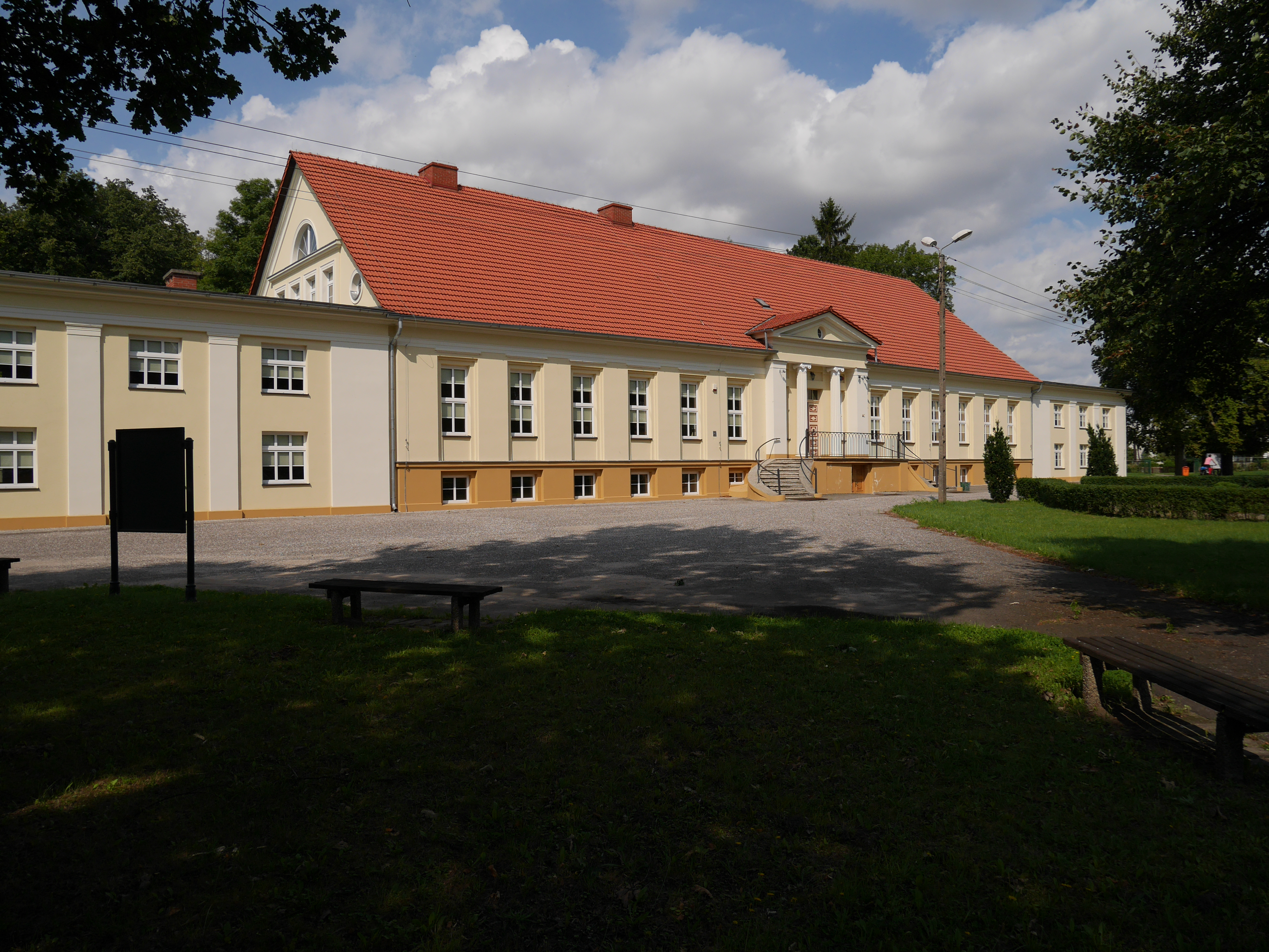 Krajenka, dwór, ob. szkoła (dec.: pałac), ok. 1825